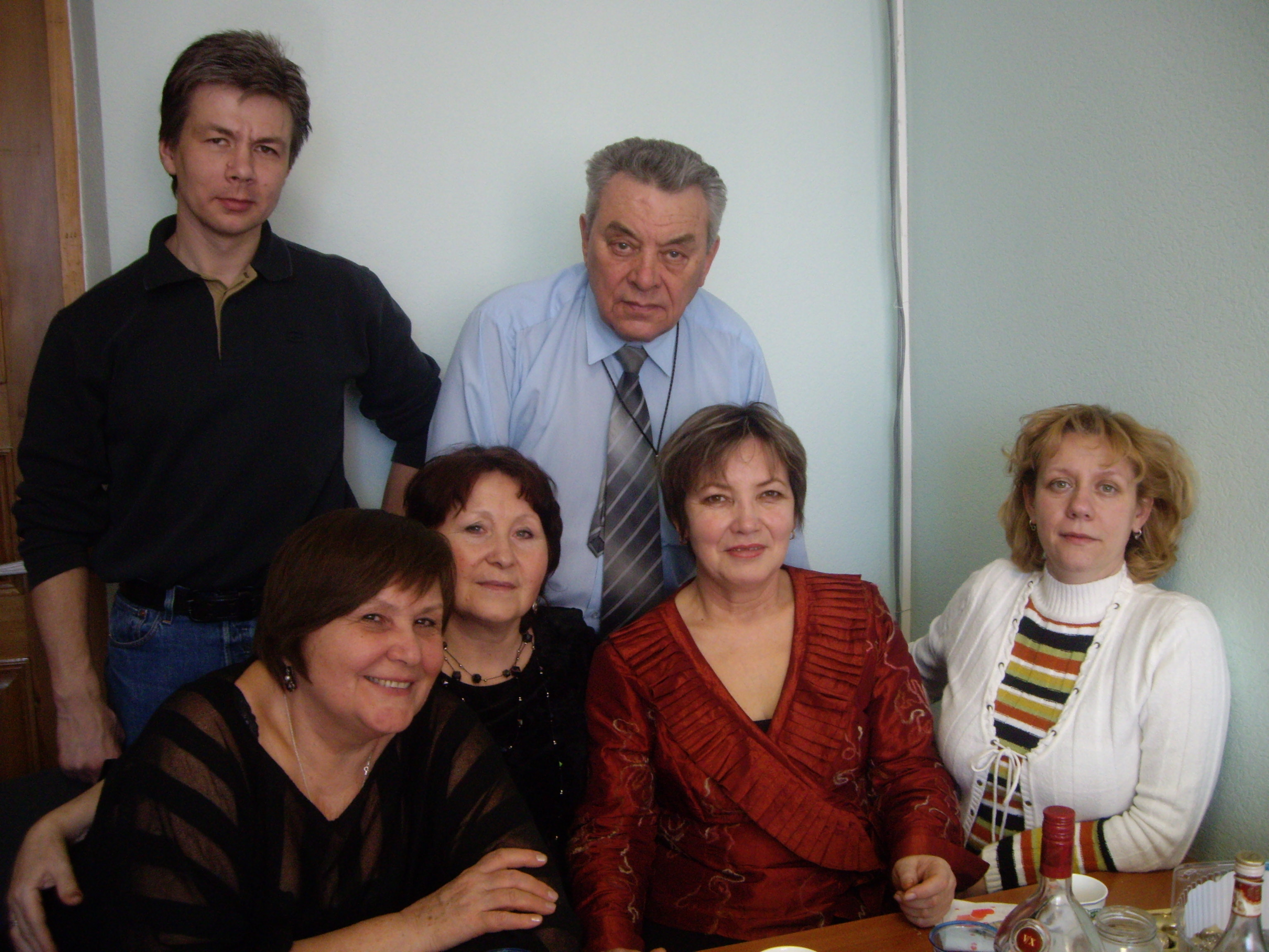 Палычев В.Н. в окружении сотрудников компании ООО "АНЕГА-Бурение". Отмечают женский день - 8 марта!